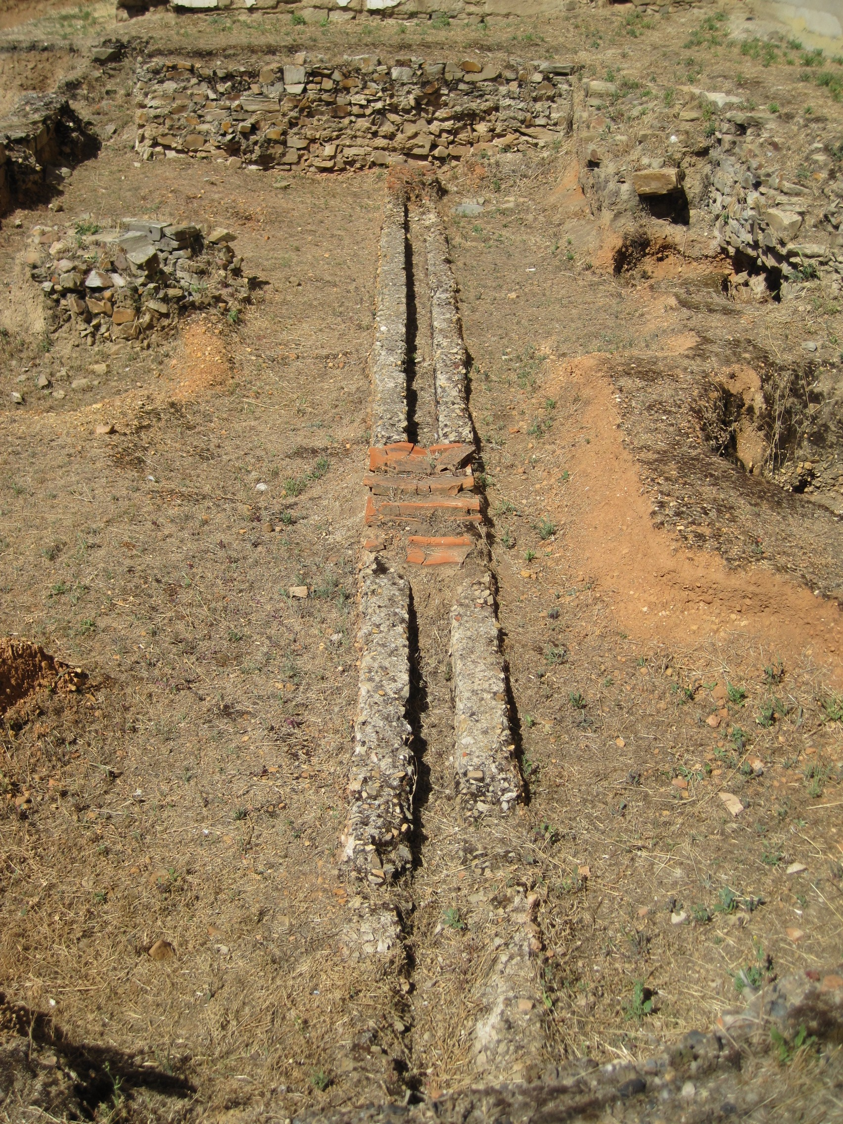 Canalización romana en el cierre sur del foro de Asturica Augusta (Astorga, León, España).